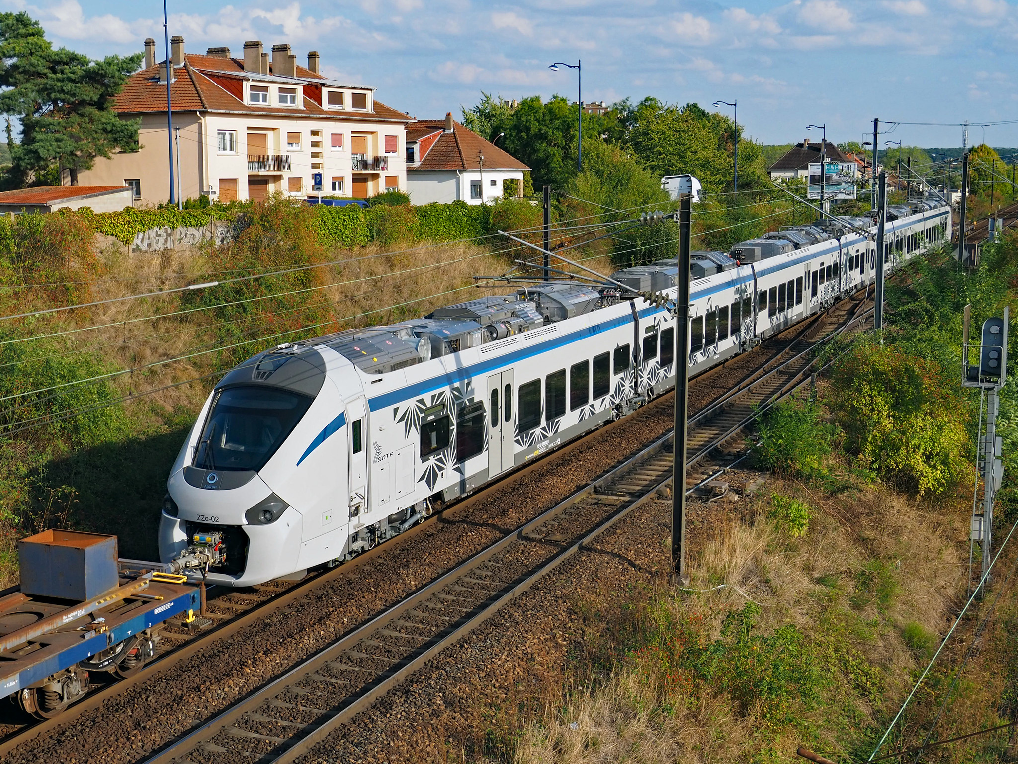 Automotrice Régiolis lors de son acheminement entre Reischoffen et Fos-sur-Mer en vue de son expédition pour l'Algérie.